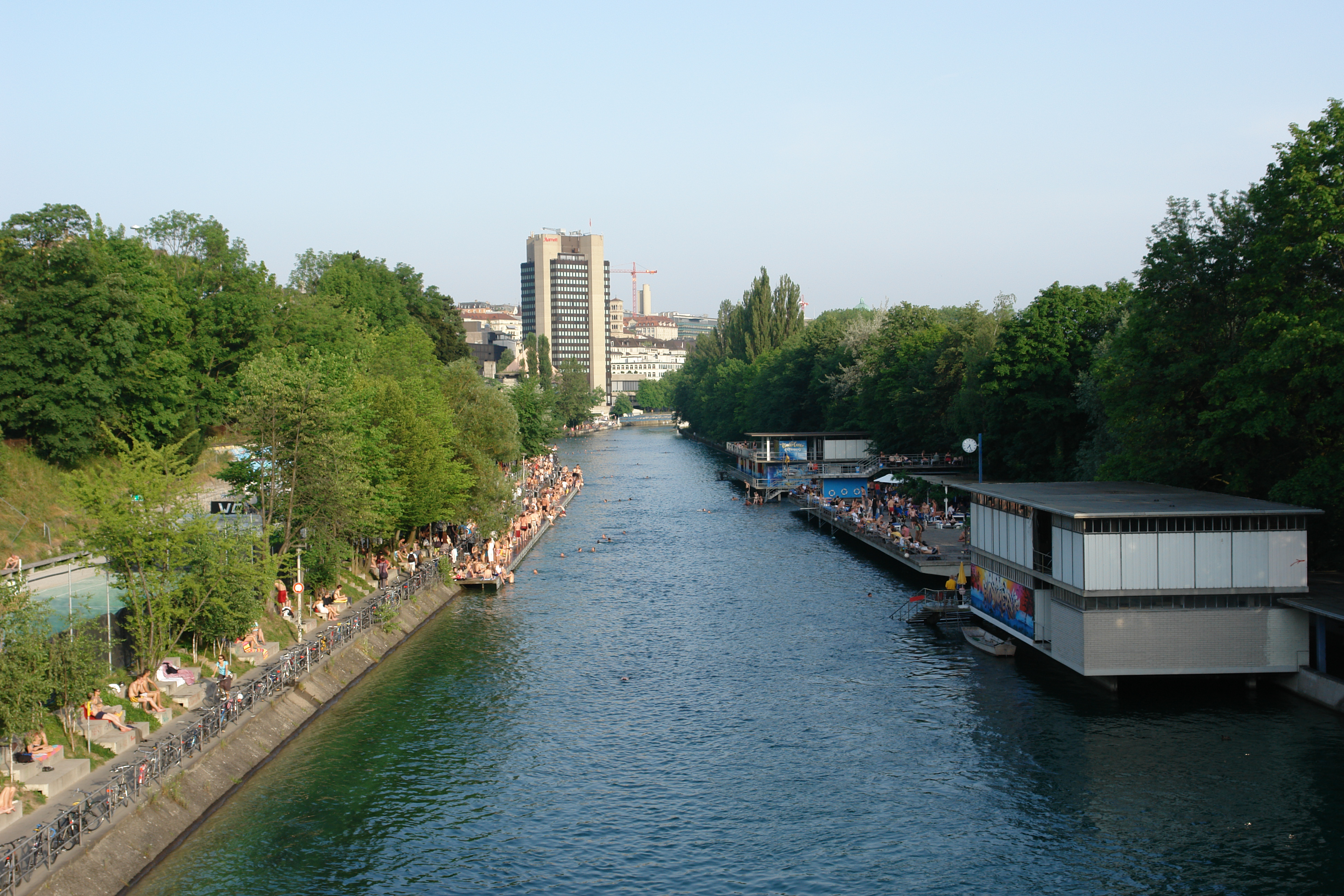 Flussbadeanstalt „Oberer Letten“ von der Kornhausbrücke flussaufwärts gesehen, Hotel Mariott im Hintergrund.